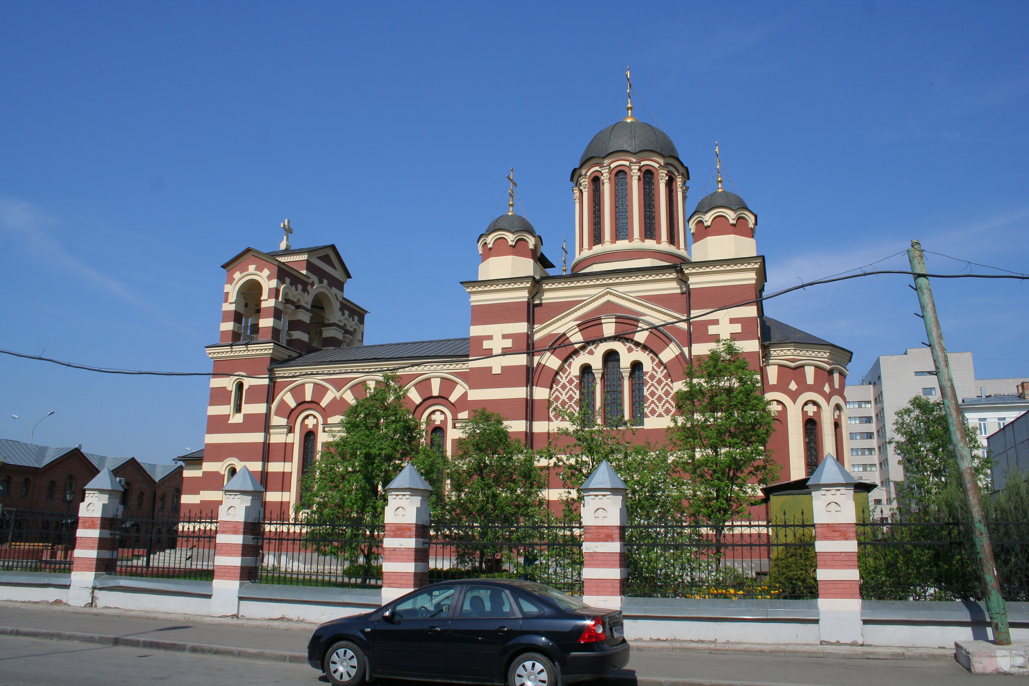 Kirche der Gottesmutter-Ikone von Vatopedi nahe dem Chodynka-Feld in Moskau